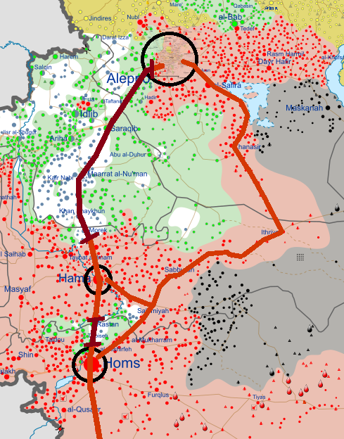 وضعیت دسترسی زمینی در شمال مرکز سوریه